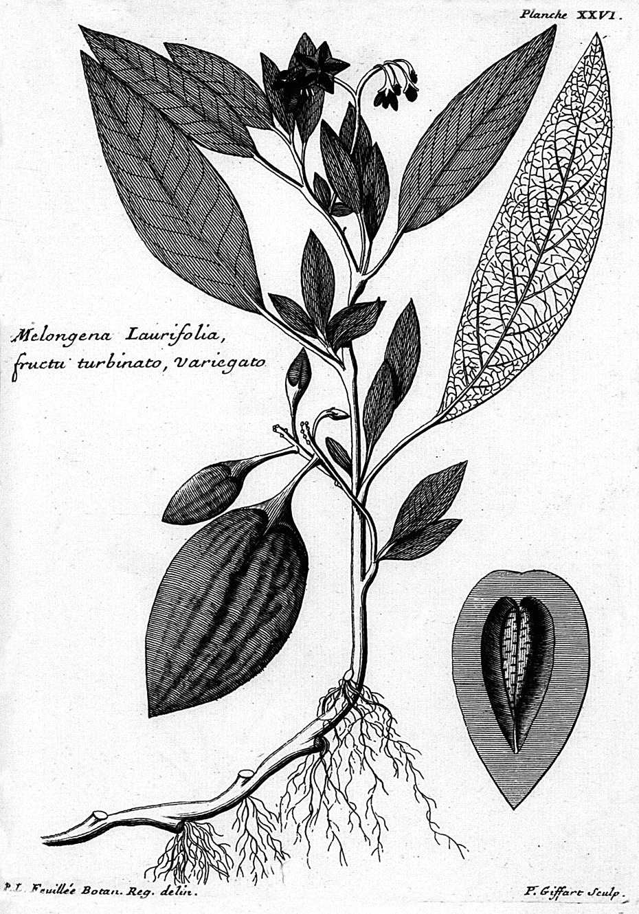 Solanum muricatum Aiton". In: "Journal des Observations Physiques, Mathematiques et Botaniques, faites par l'ordre du roy sur les côtes orientales de l'Amérique méridionale et dans les Indes occidentals depuis l'année 1707 jusques en 1712." by Louis Feuillee, (1660-1732)